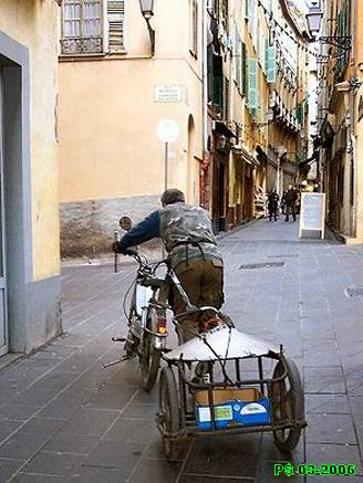 Le coursier de la mère Teresa s'en va livrer la socca et les pizze au cours Saleya. Rue Droite, près de la Rue Rossetti.